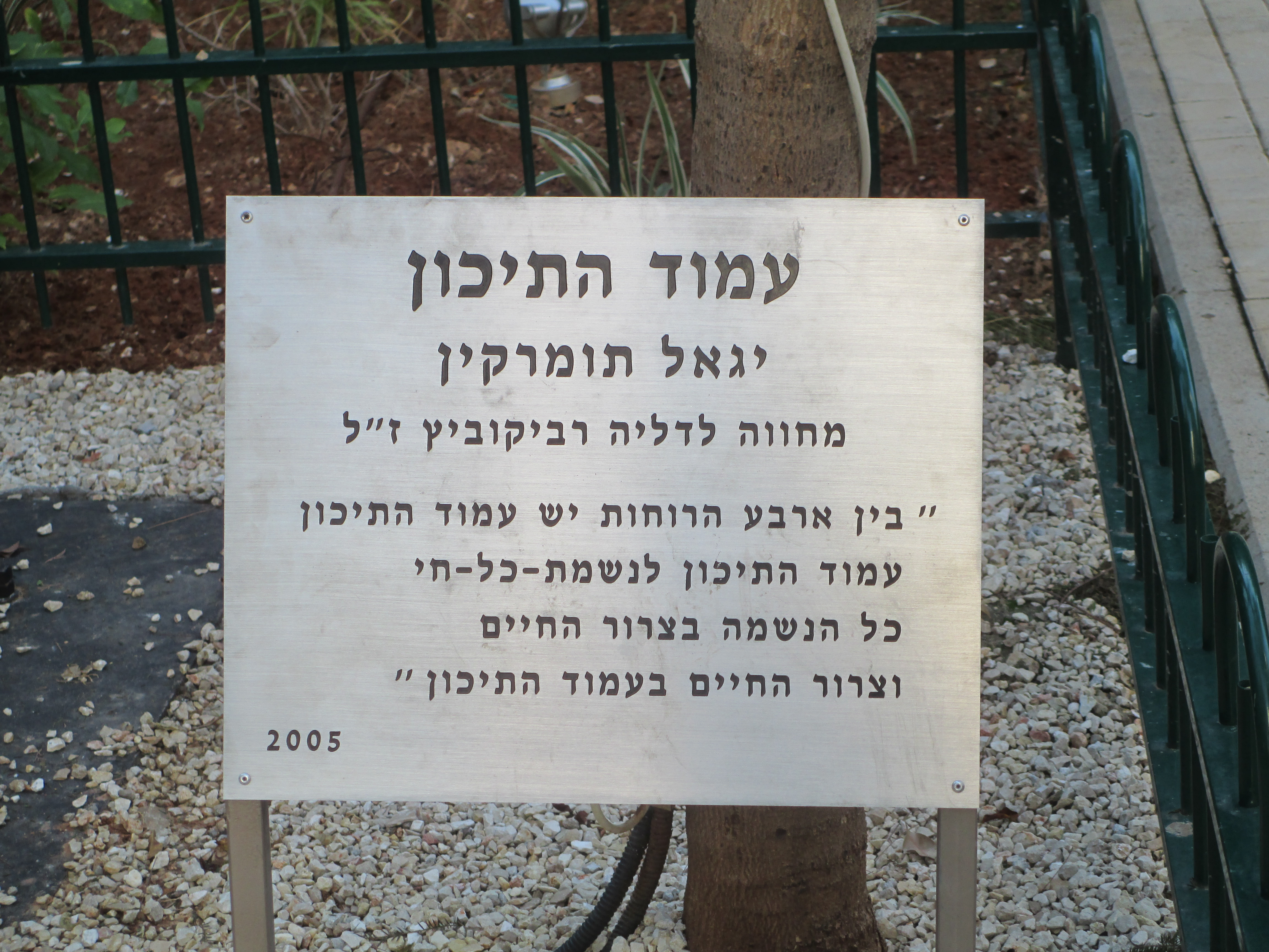 שלט הנצחה למשוררת דליה רביקוביץ בגן מאיר בתל אביב